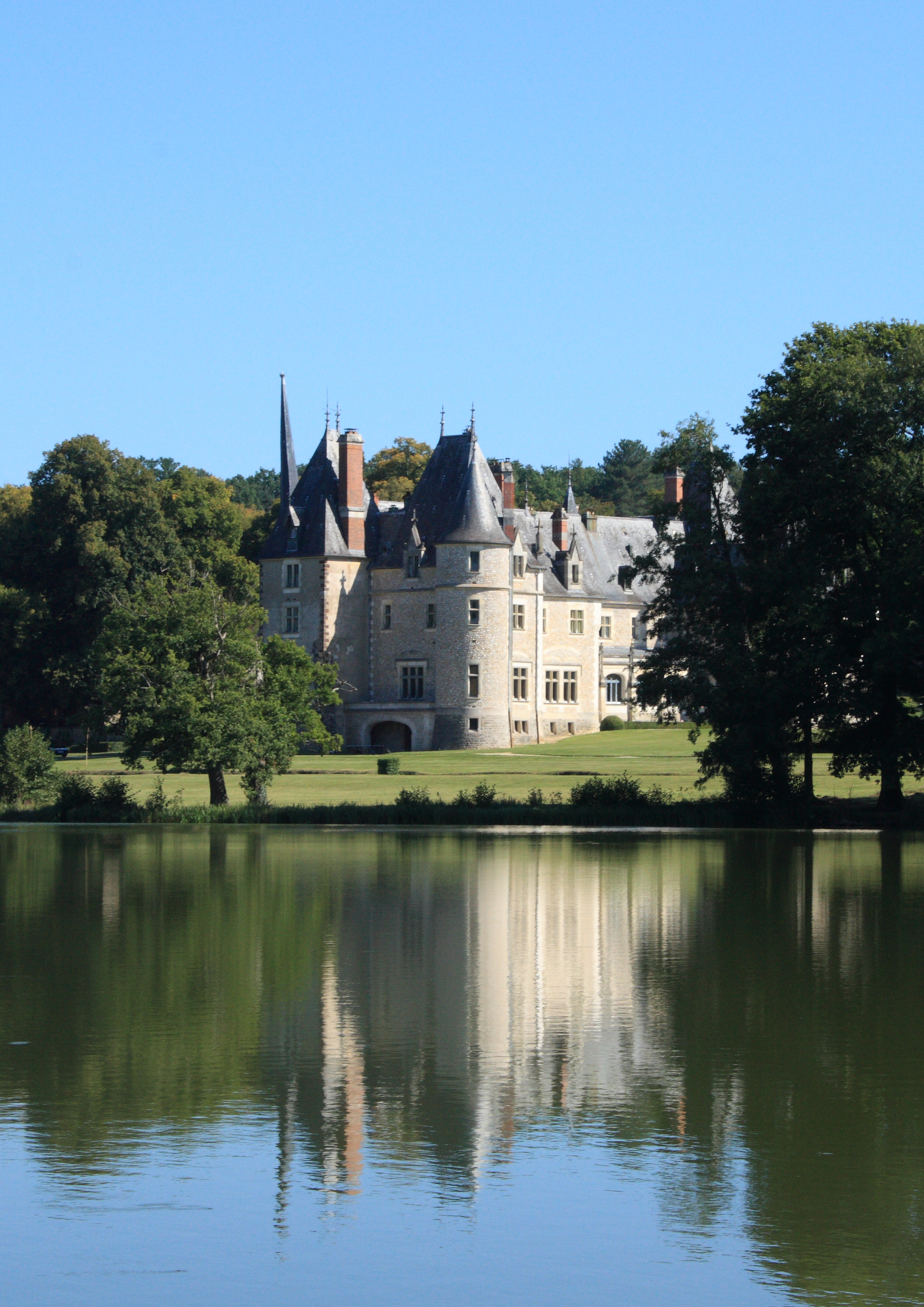 Château de la Verrerie (Cher)